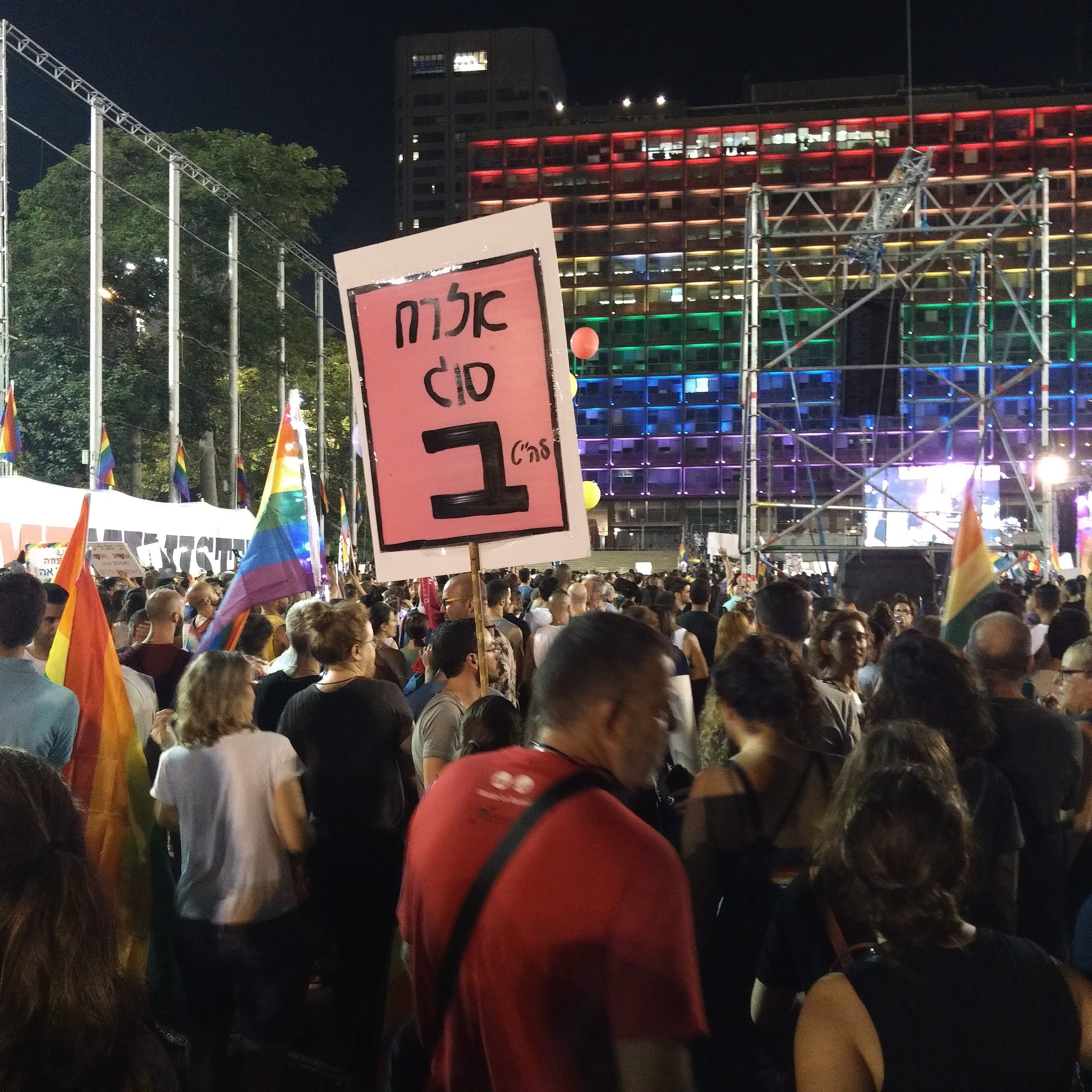 הפגנה בכיכר רבין, 22 ביולי 2017